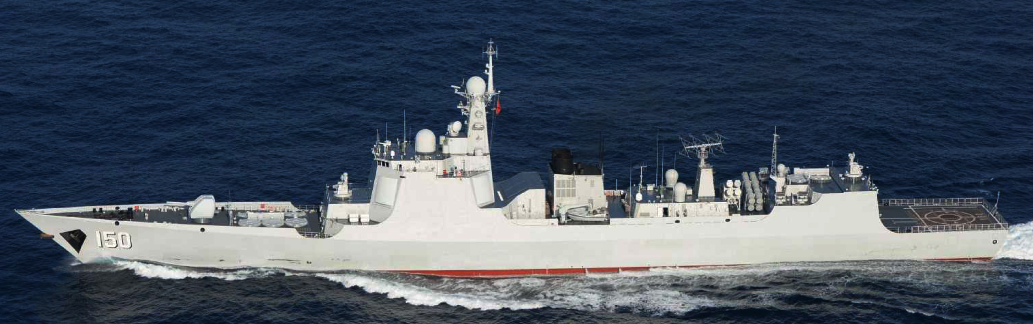 ７月１８日（土）午前１０時半頃から午後４時半頃にかけて、海上自衛隊第５航空群所属「Ｐ－３Ｃ」（那覇）及び第１２護衛隊所属「せんだい」（呉）が、以下のとおり、宮古島の北東約１１０ｋｍの海域を東シナ海から太平洋に向けて南東進する中国艦艇３隻を確認した。午後２時頃、ルーヤンII級ミサイル駆逐艦１隻。